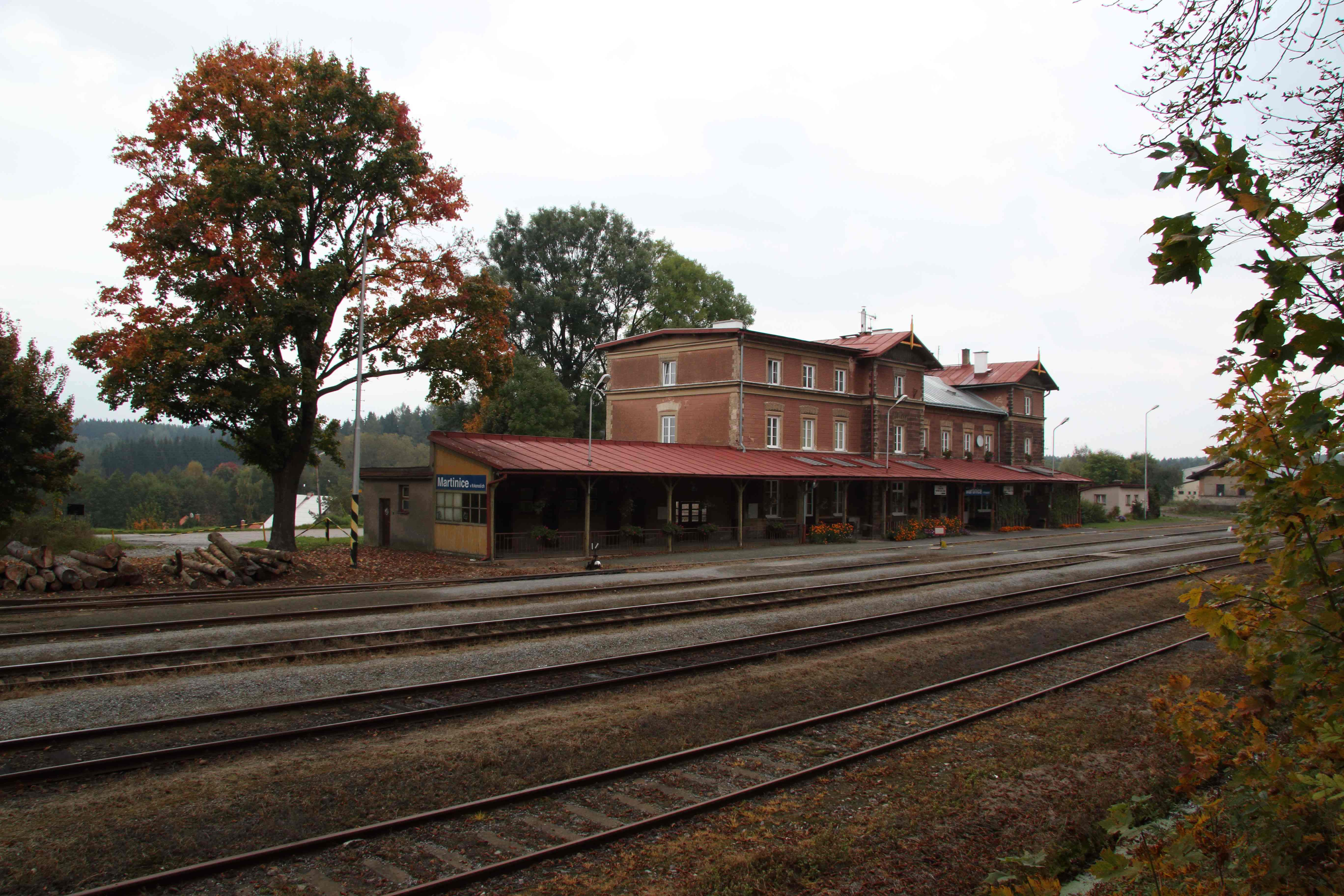 Výpravní budova